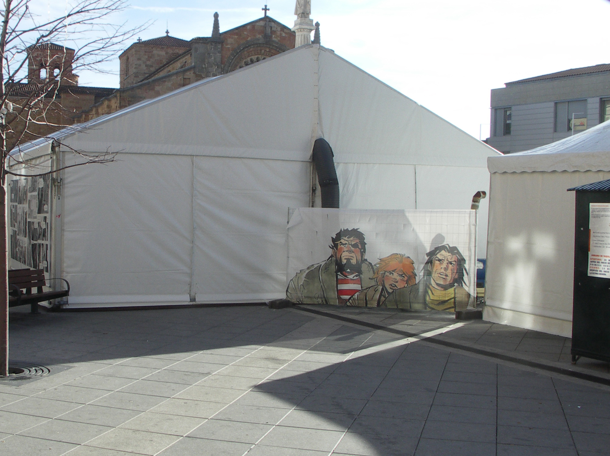 Lateral de la carpa I Salón del cómic, Ávila